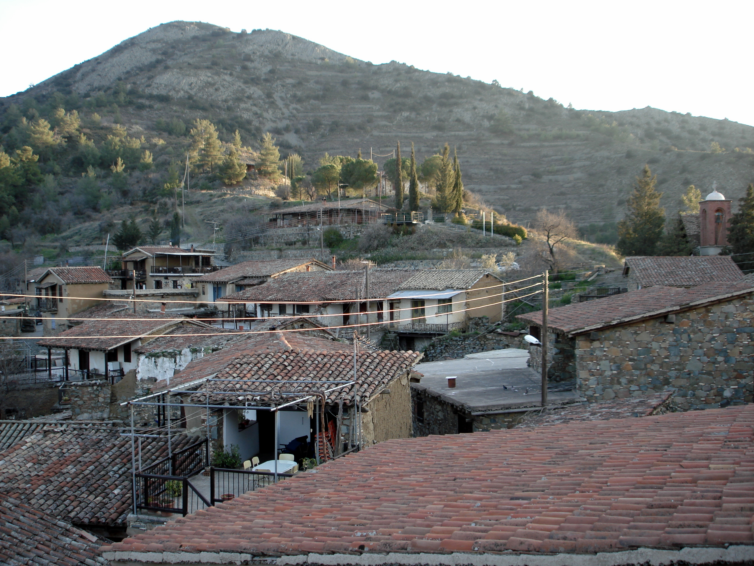 Fikardou, Cyprus